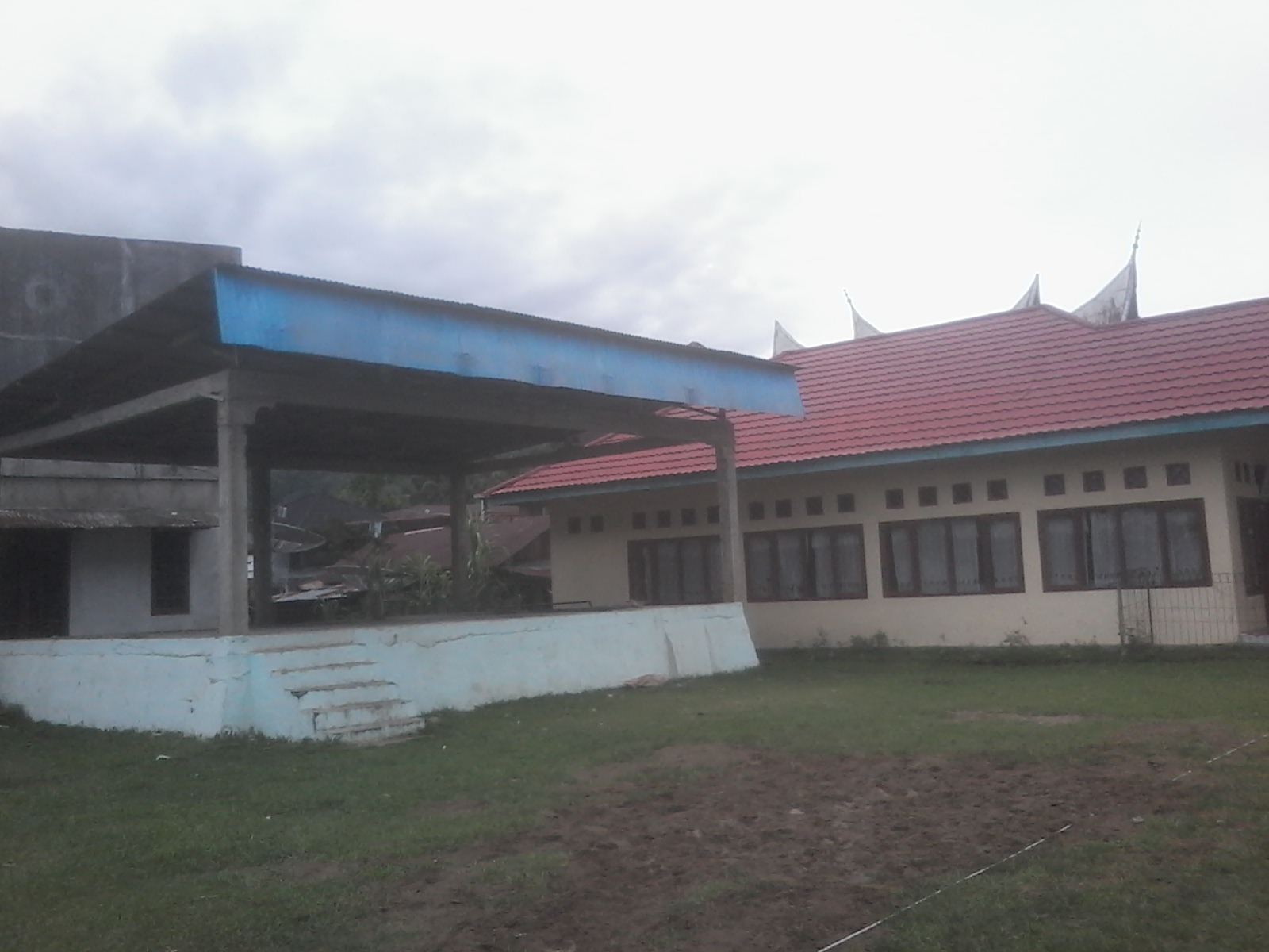 Medan Nan Bapaneh